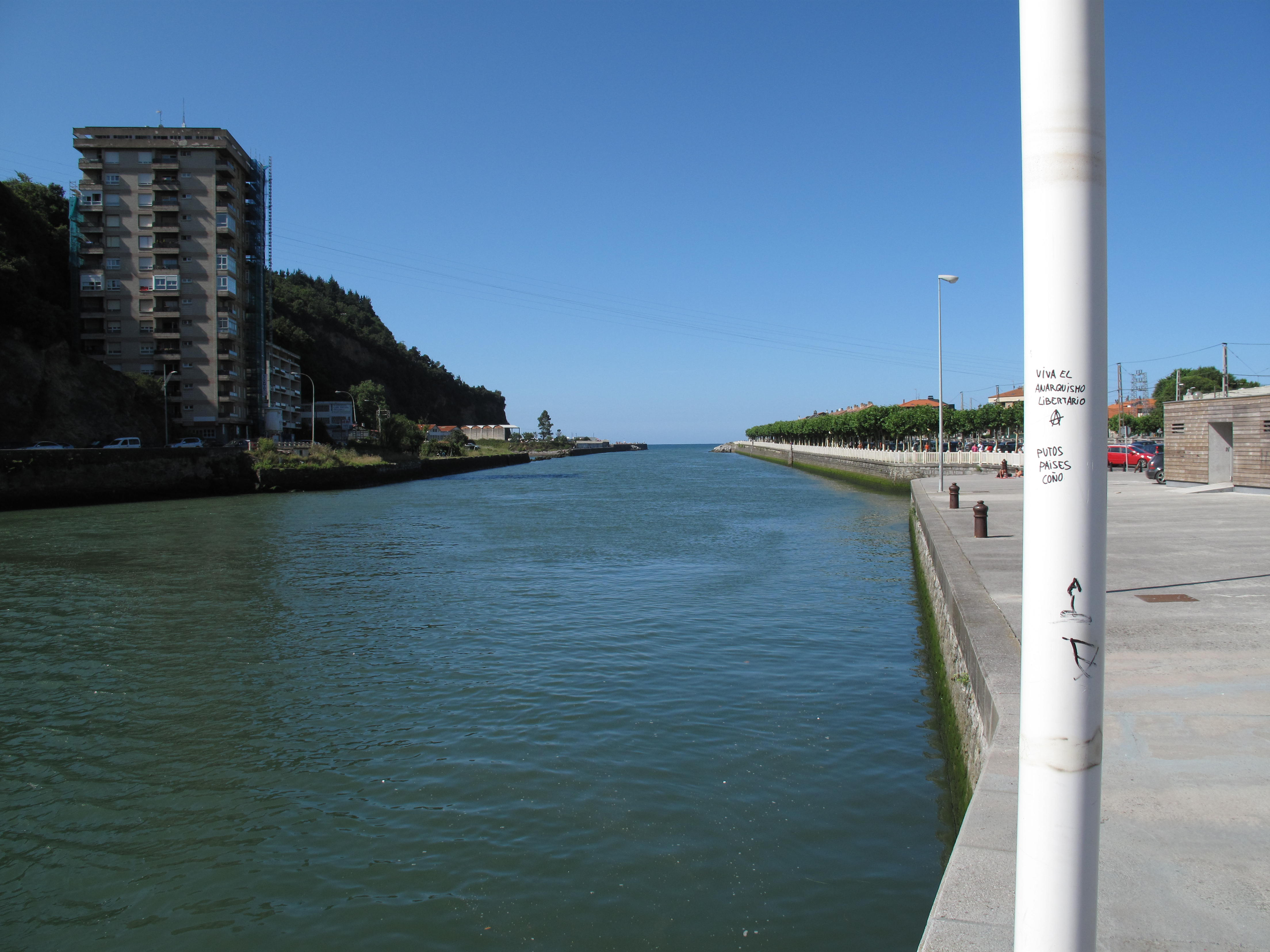 Rio Deva, en Deba (Guipuzcoa). Desembocadura.